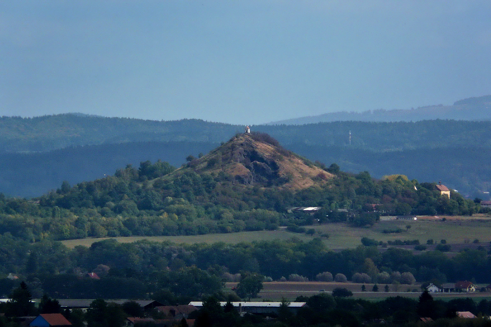 Česky: Zebín z vrchu Houser